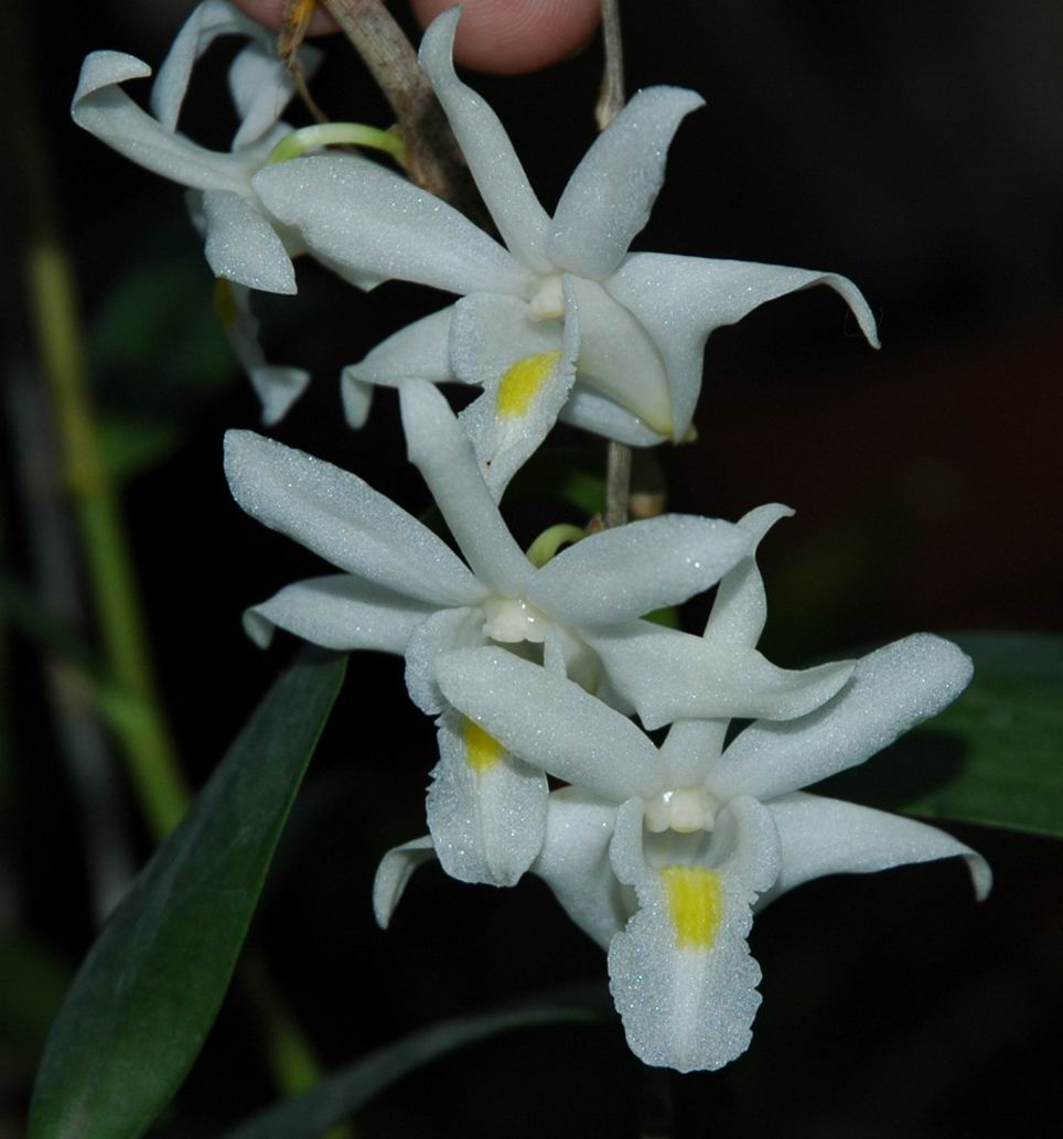 Dendrobium crumenatum dalam satu tandan.